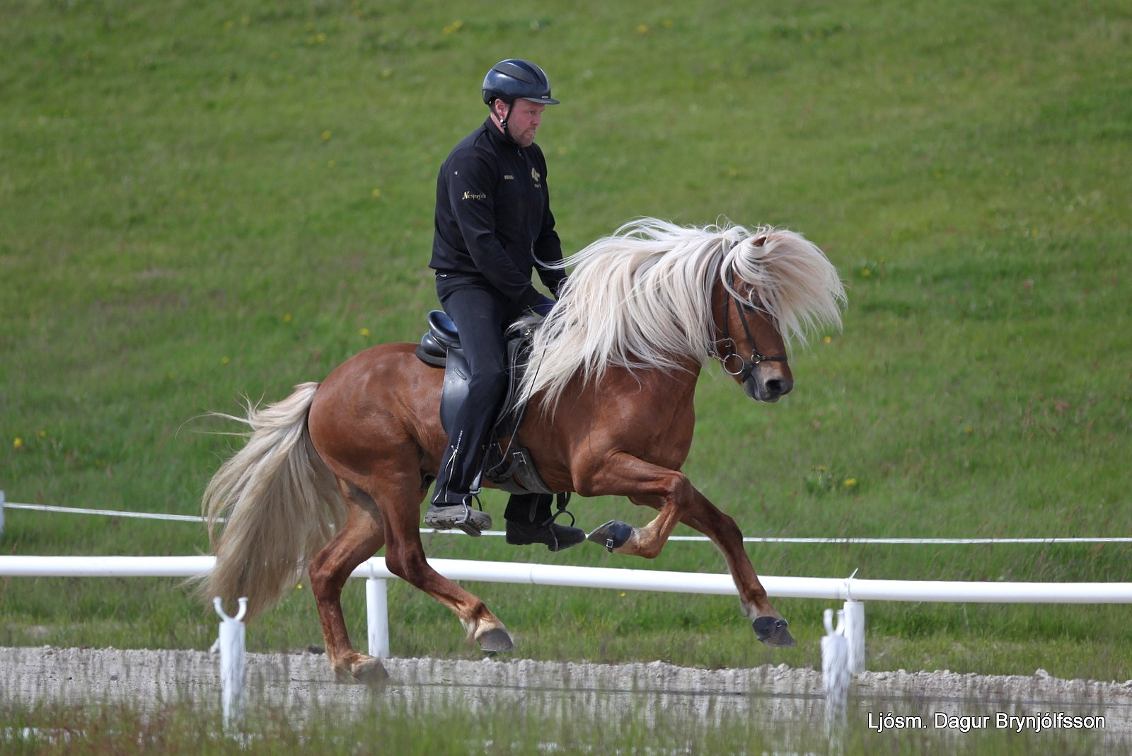 Sigurður Sigurðarson